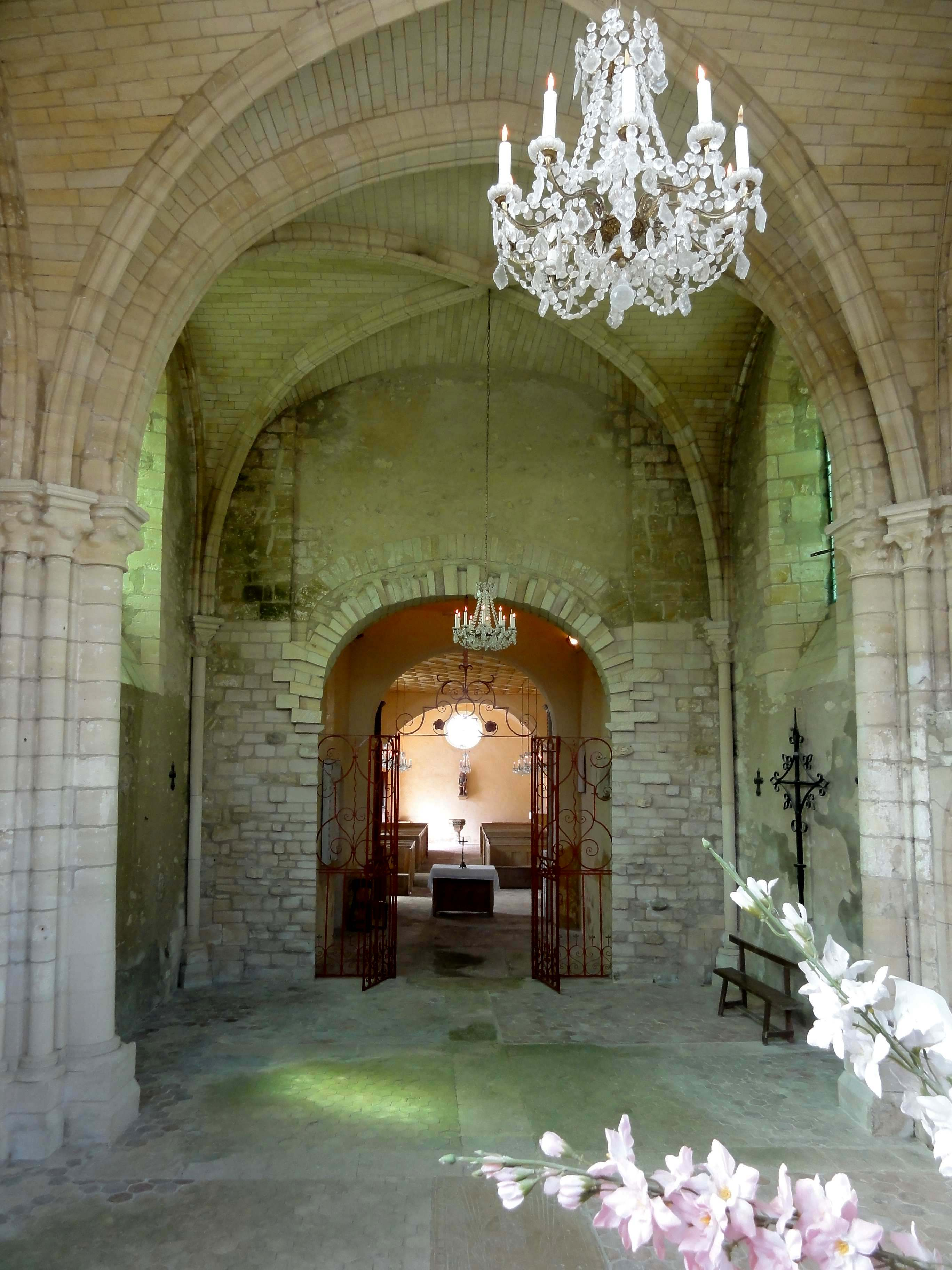 Intérieur de l'église (voir titre).